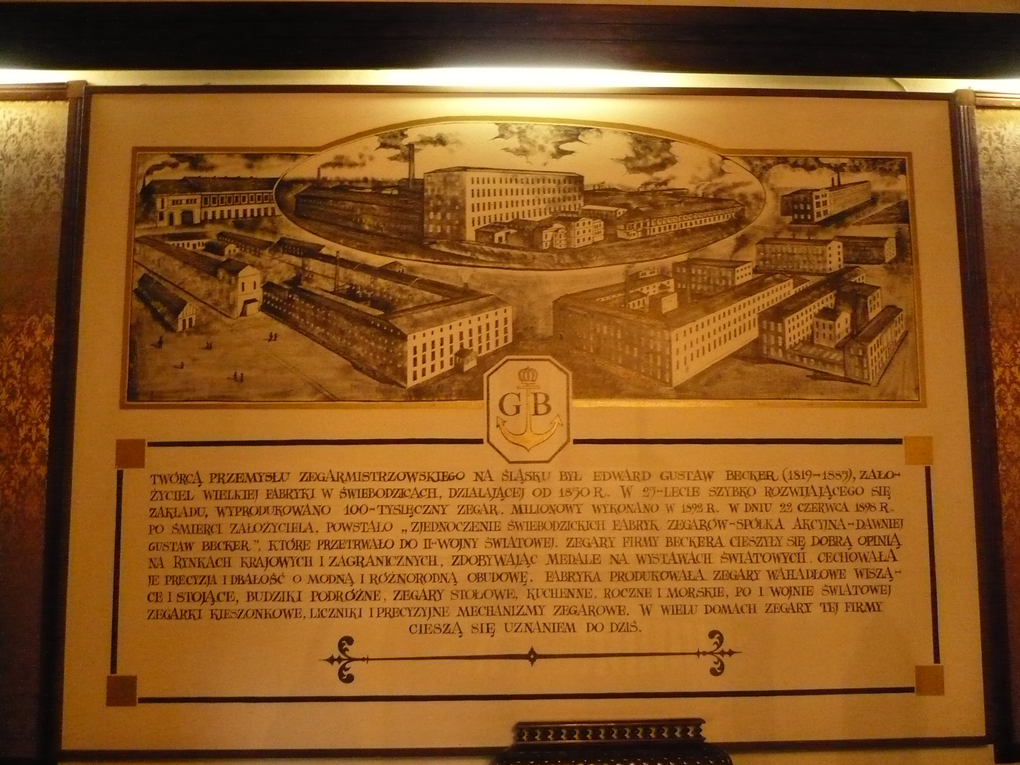 Historia fabryki Gustava Becker